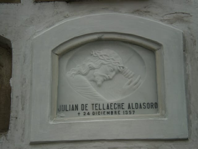 Lápida del pintor Julián de Tellaeche en el cementerio Presbítero Maestro de Lima (Perú)